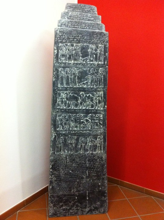 Calco dell'Obelisco Nero del British Museum al museo di Cologna